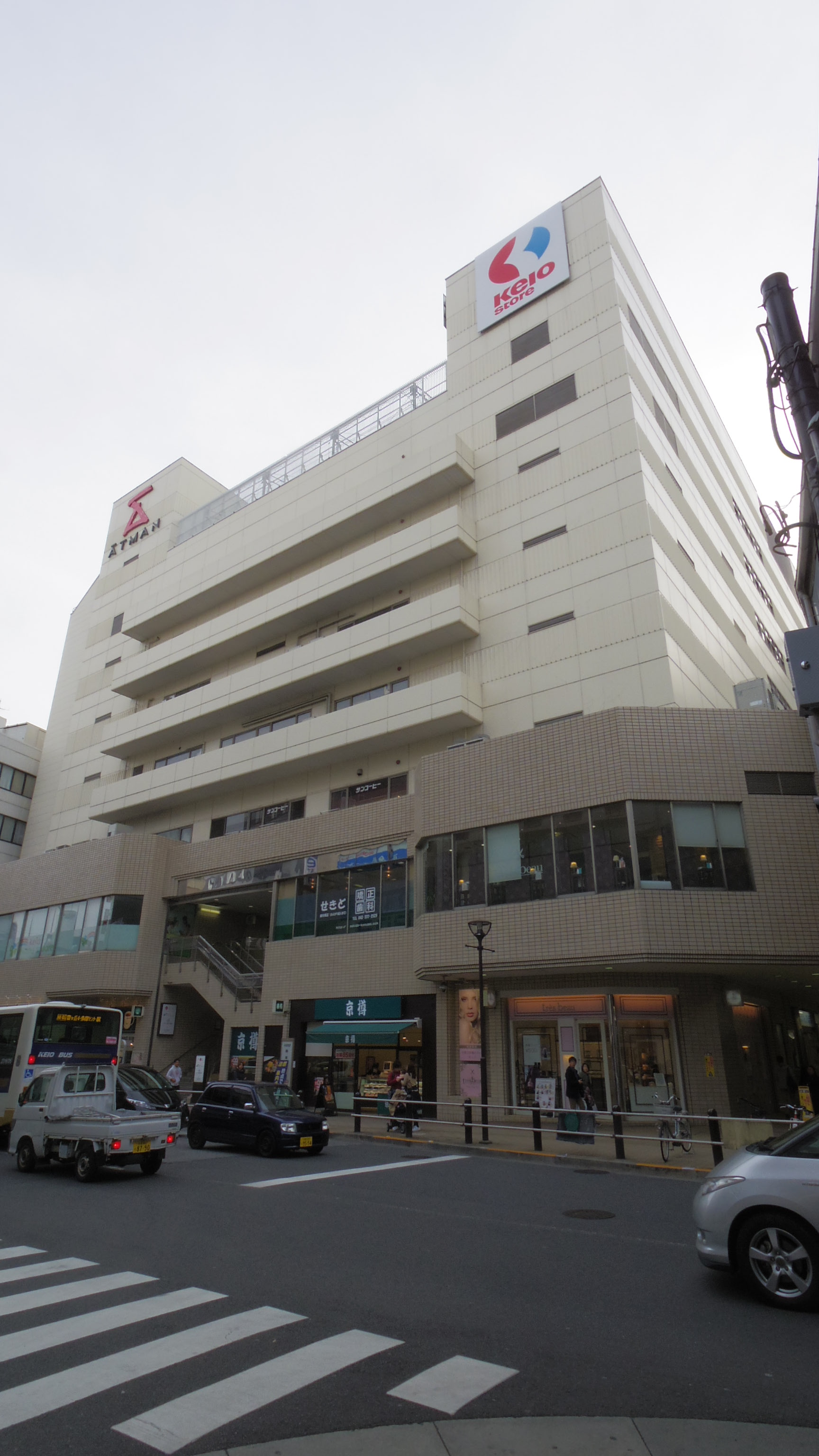 京王ストア桜ケ丘店（聖蹟桜ヶ丘駅「せいせき」A館）外観。